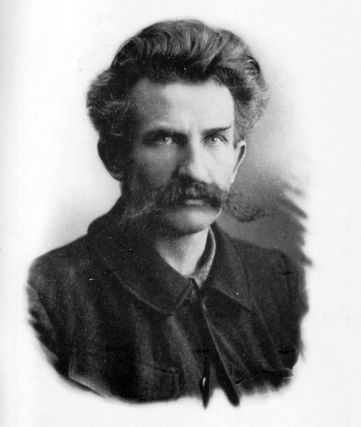 Fotographie von Charles Naine, sozialdemokratischer Schweizer Politiker, Pazifist und Publizist aus Neuenburg, ca. 1900.